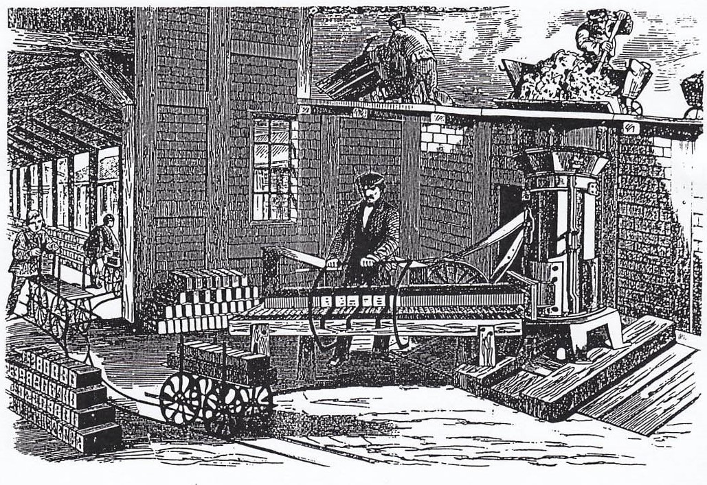 Feldbahnen von C. Schlickeysen, Maschinen-Fabrikant, Berlin, Katalog, 1860